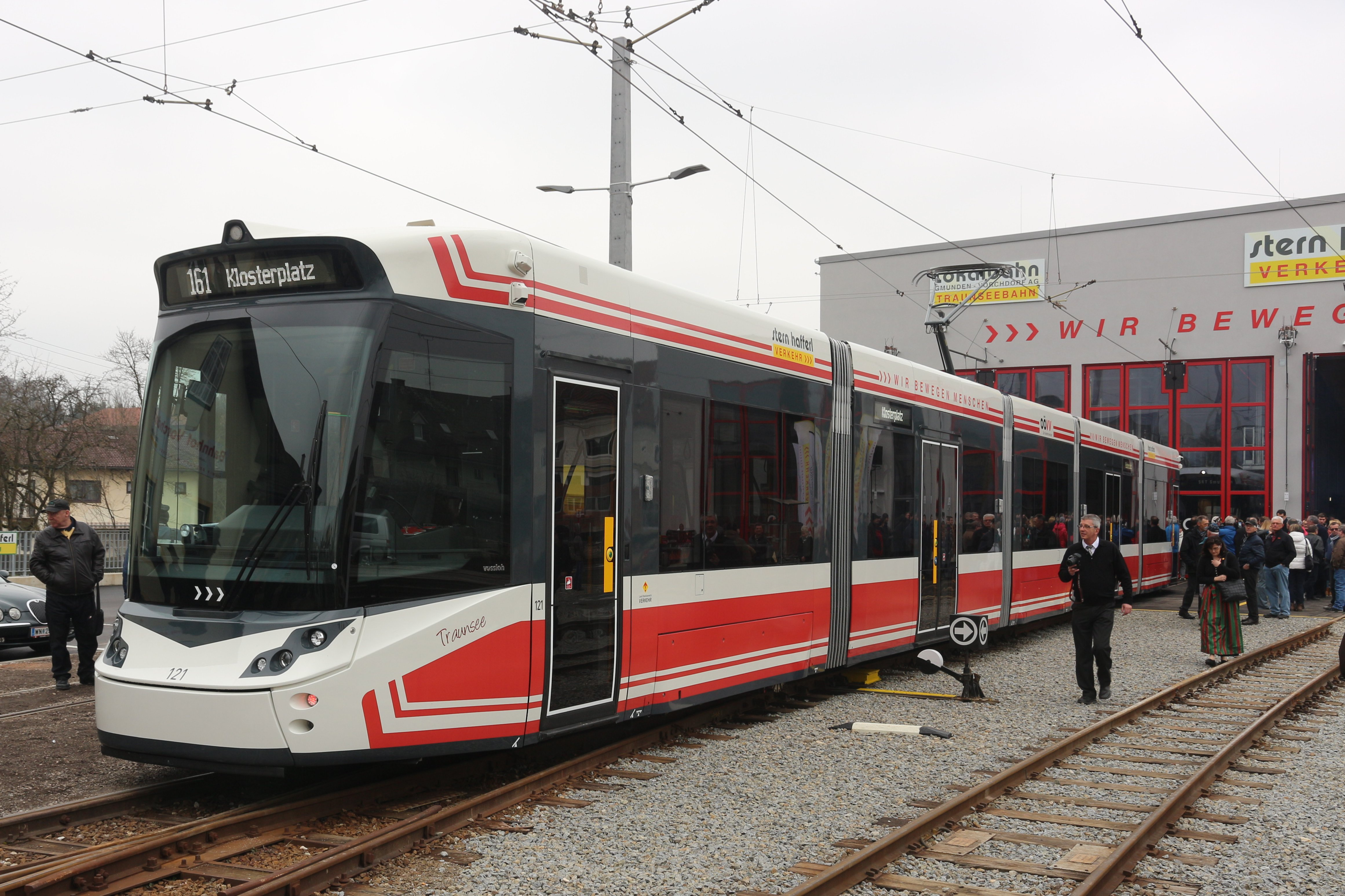 Triebwagen Nr. 121 kurz vor der Jungfernfahrt Vorchdorf→Gmunden